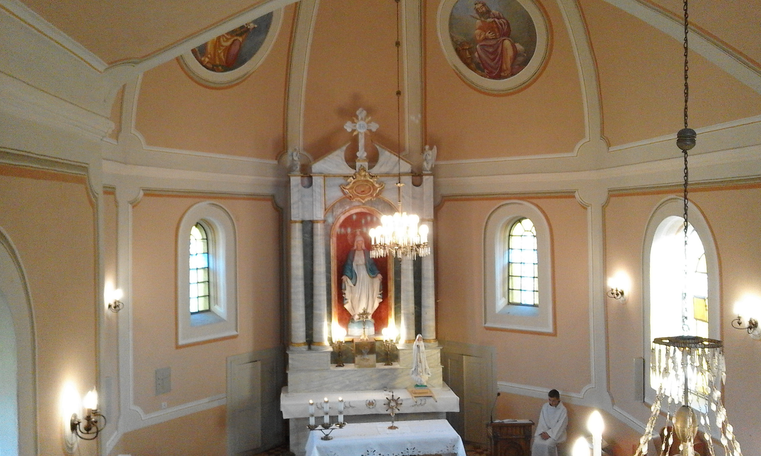 W ołtarzu głównym figura Matki Bożej Niepokalanej. Fotografia została wykonana 13 czerwca 2017 r. podczas mszy upamiętniającej 100 rocznicę objawień Matki Bożej w Fatimie.